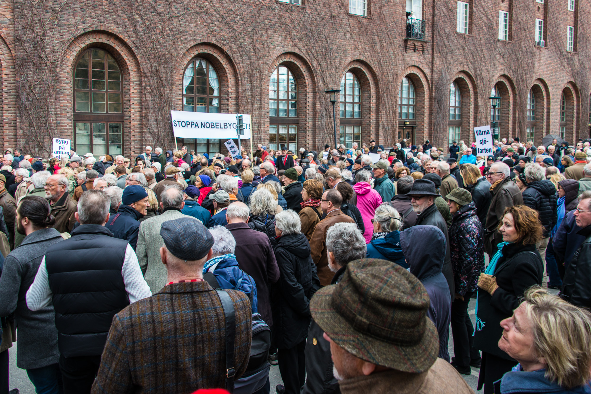 Motståndare till byggandet av ett Nobel Center på Blasieholmen samlas utanför Stockholms stadshus på Ragnar Österbergs plan den 18 april 2016. Bland talarna, som representerade olika partier och organisationer, inledde Björn Tarras-Wahlberg från Nätverket Bevara Blasieholmen – Flytta Nobelbygget. Det fortsatte med Fredrik von Feilitzen från Samfundet S:t Erik, Ulf Johansson från Norrmalms stadsdelsnämnd, Kerstin Westerlund från Stockholm Skyline, kulturhistorikern Edward Blom, Lennart Rohdin från Skärgårdsstiftelsen, Cecilia Obermüller (MP), Björn Ljung (L), historikern Nils Ahlberg, Erik Slottner (KD) och Jenny Ribsskog (SD).